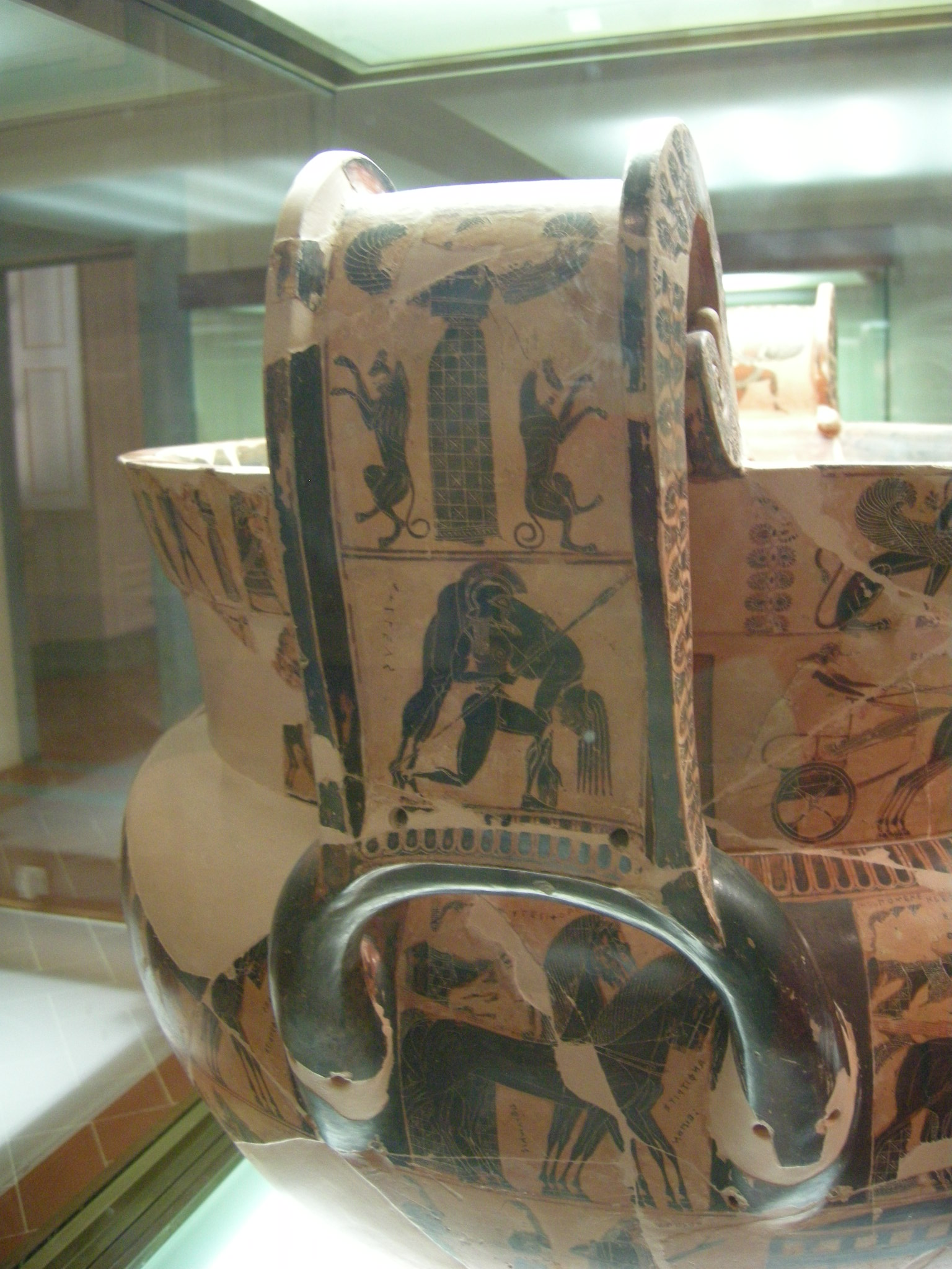 Athenian volute-krater.